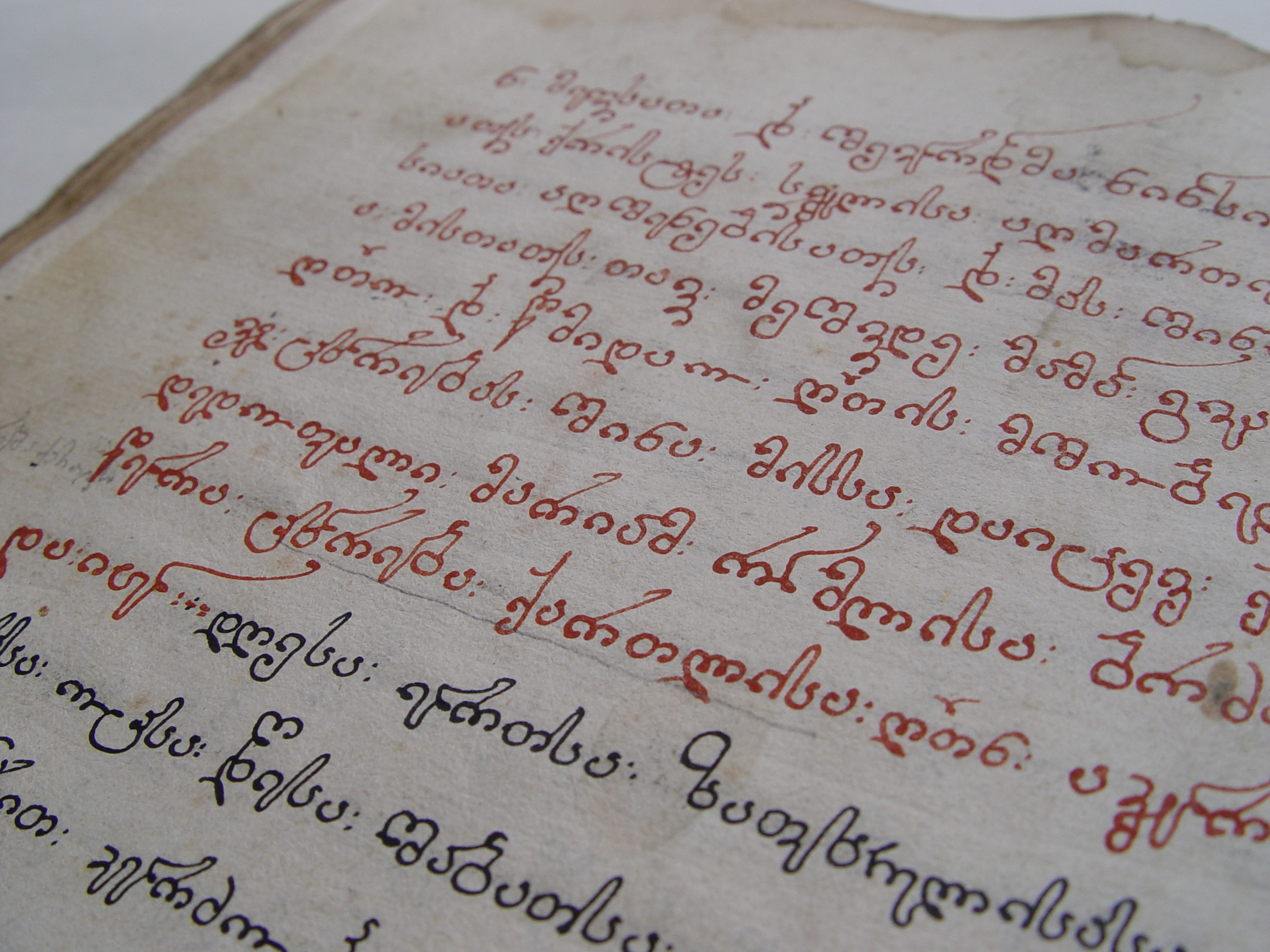 მარიამისეული ქართლის ცხოვრება